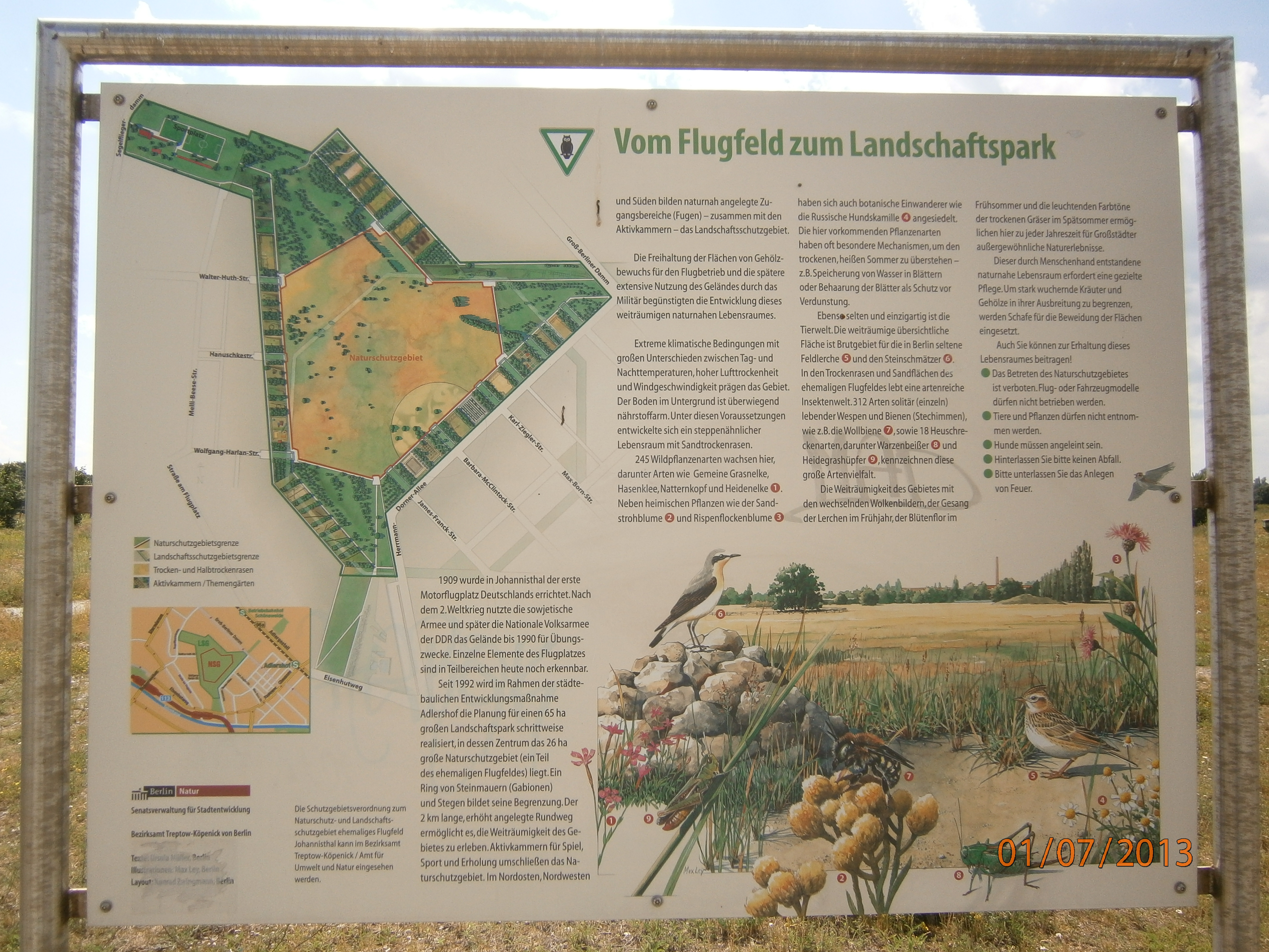 An der Ostecke - nahe der Ortsteilgrenze zu Adlershof) grenzt der Landschaftspark Johannisthal an den Groß-Berliner Damm. Hier die Erläuterungstafel am Damm.